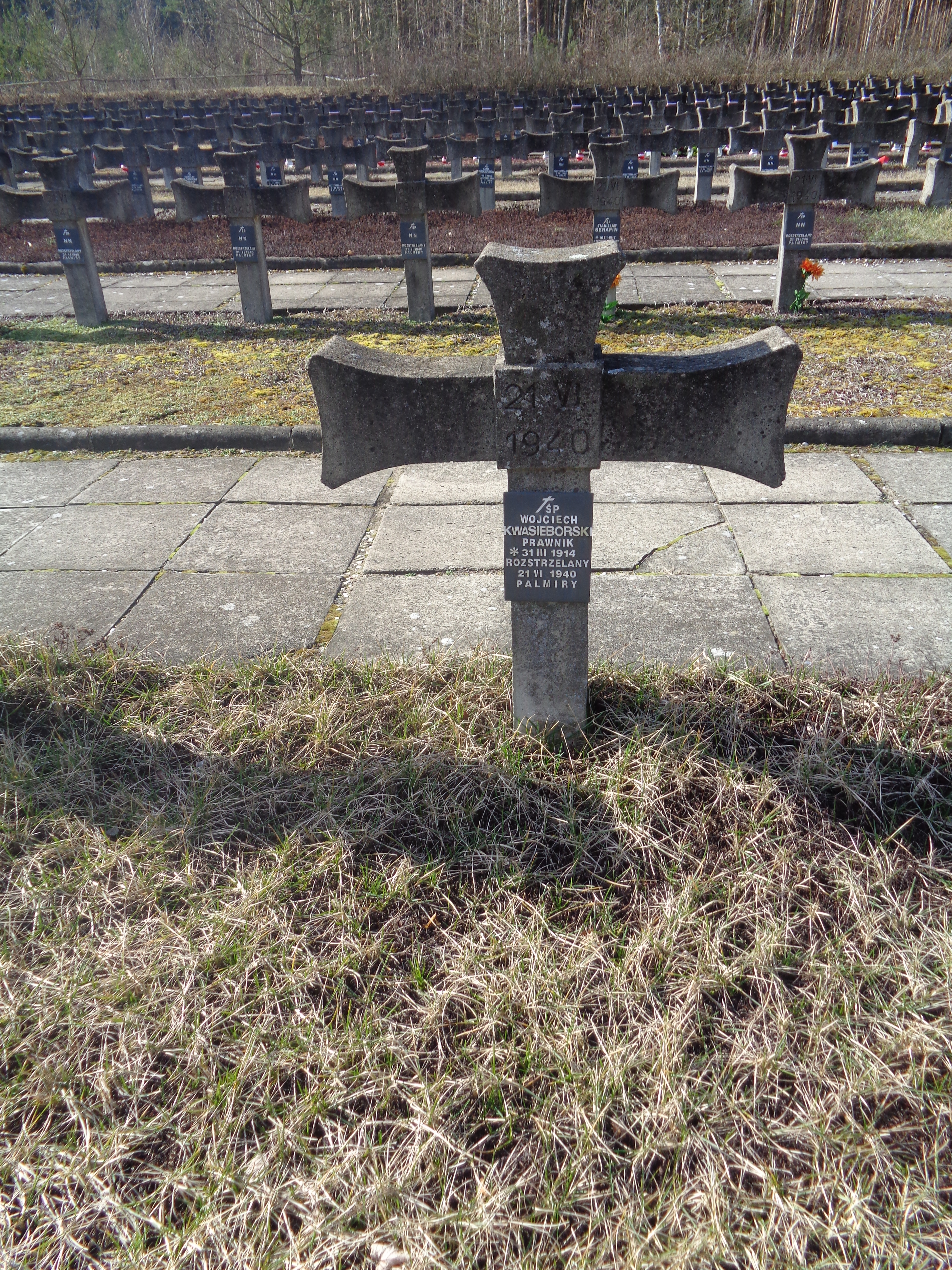 Groby Wojciecha Kwasieborskiego w Palmirach